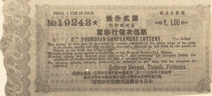 大日本帝國臺灣總督府彩票局第五期臺灣彩票